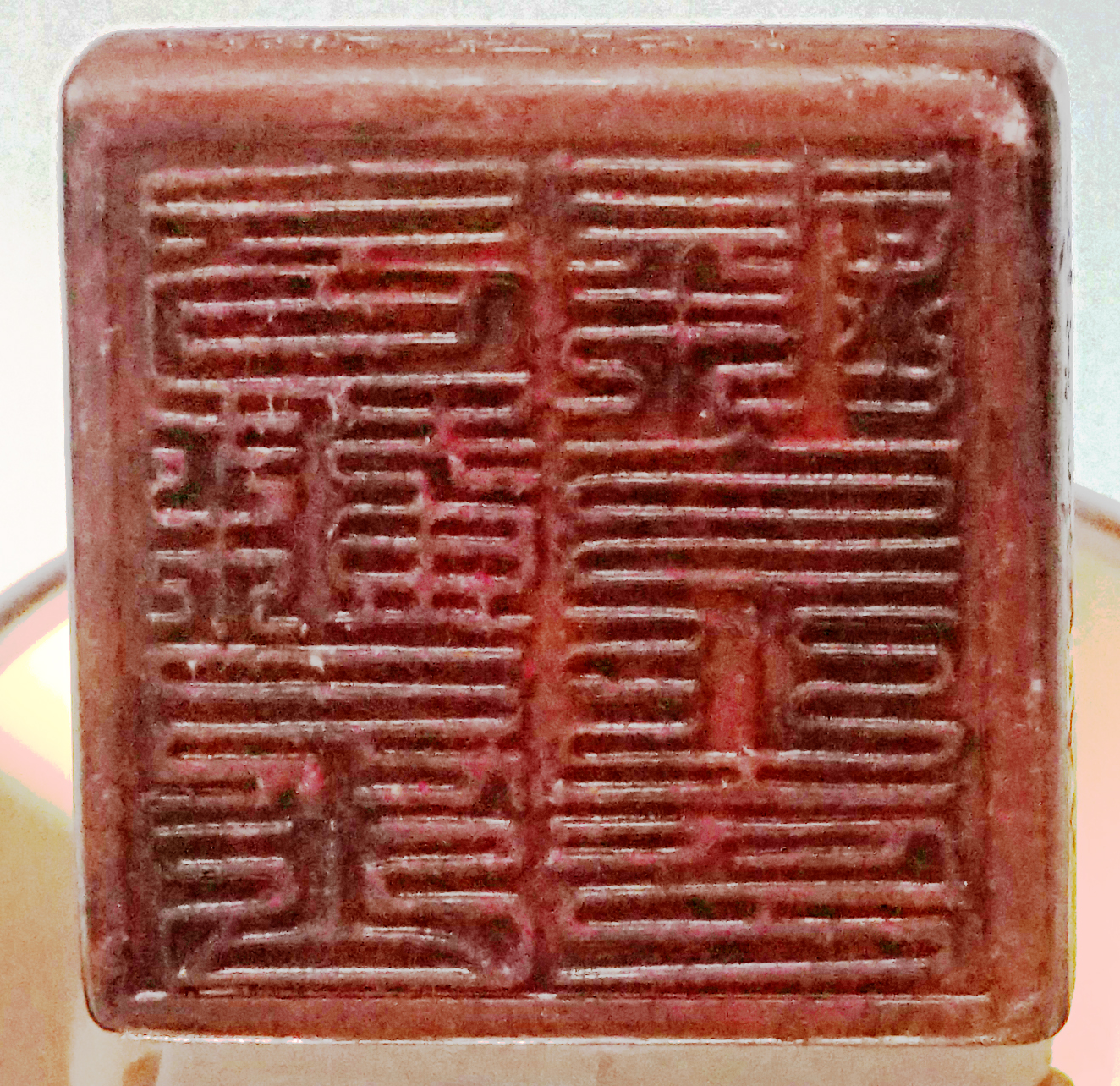 中文（中国大陆）: 曷苏昆山谋克铜官印 金大定十年（公元1170年） 出土于北安市城郊乡曷苏昆山谋克故城 李清海、王德江、孙柏林捐献 国家一级文物